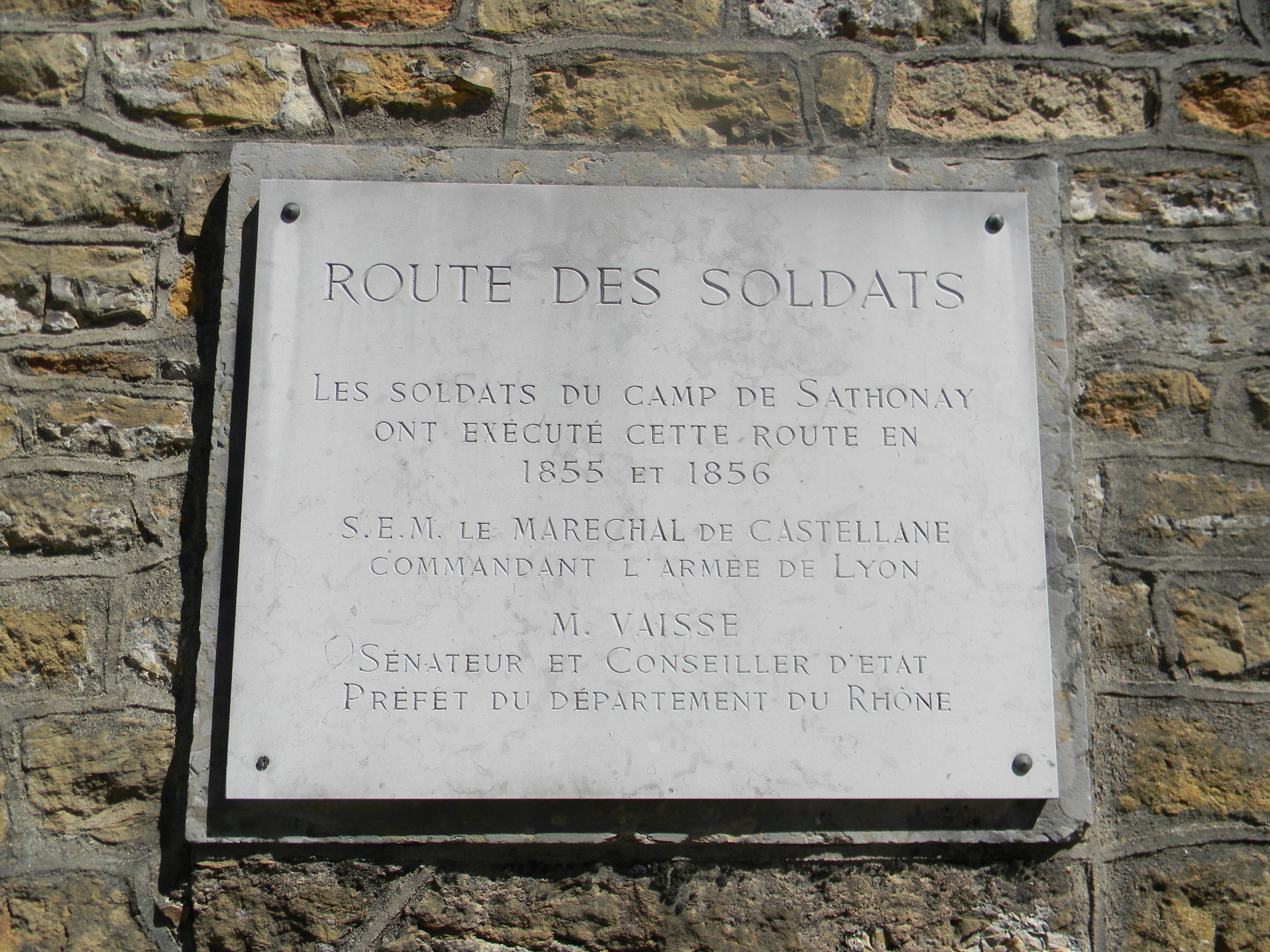 Route des Soldats Les soldats du camp de Sathonay ont exécuté sur cette route en 1855 et 1856 S.E.M le Maréchal de Castellane commandant l'armée de Lyon M. VAISSE Sénateur et conseiller d'état Préfet du département du Rhône